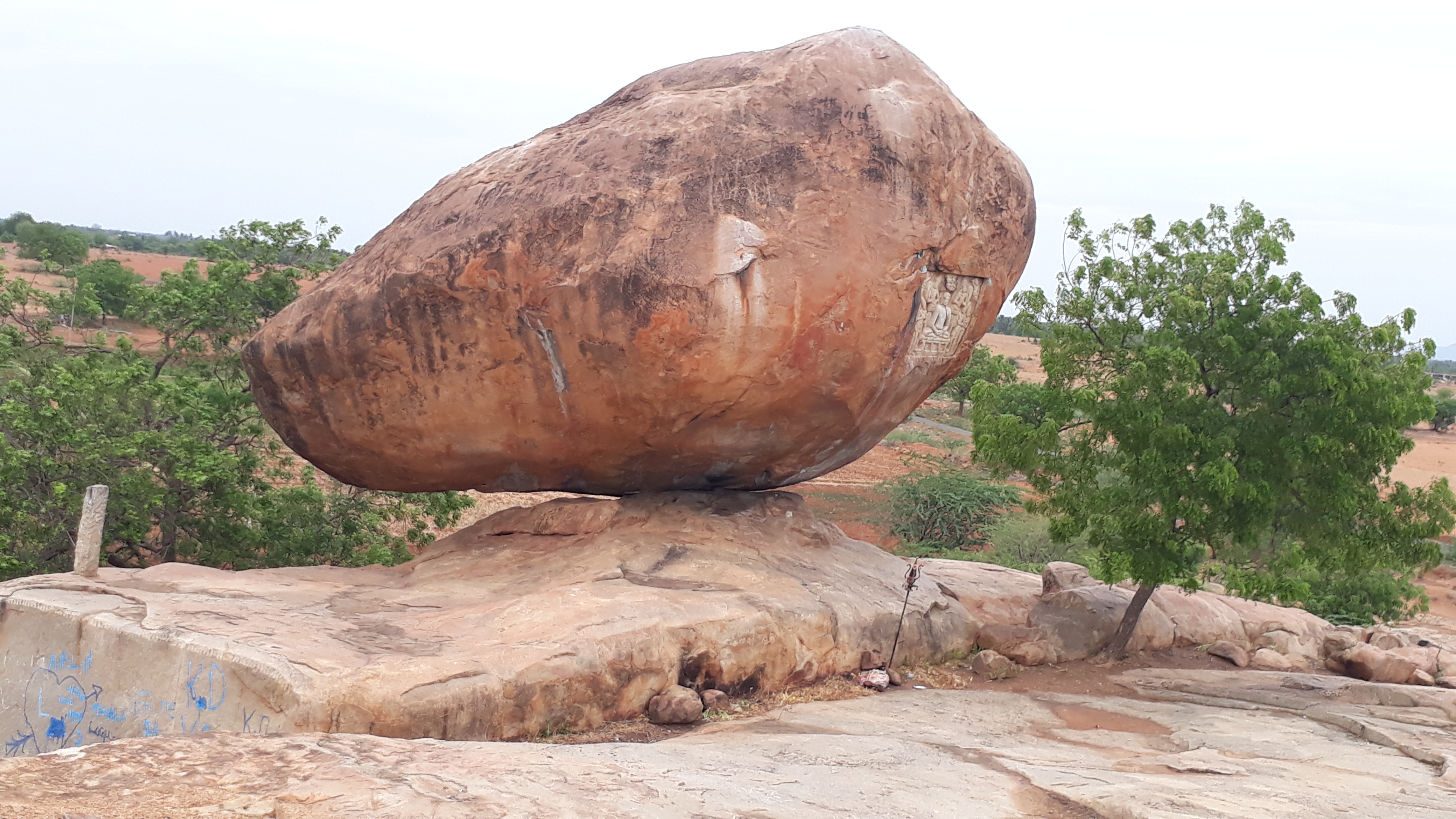 குண்டாங்கல் பாறை